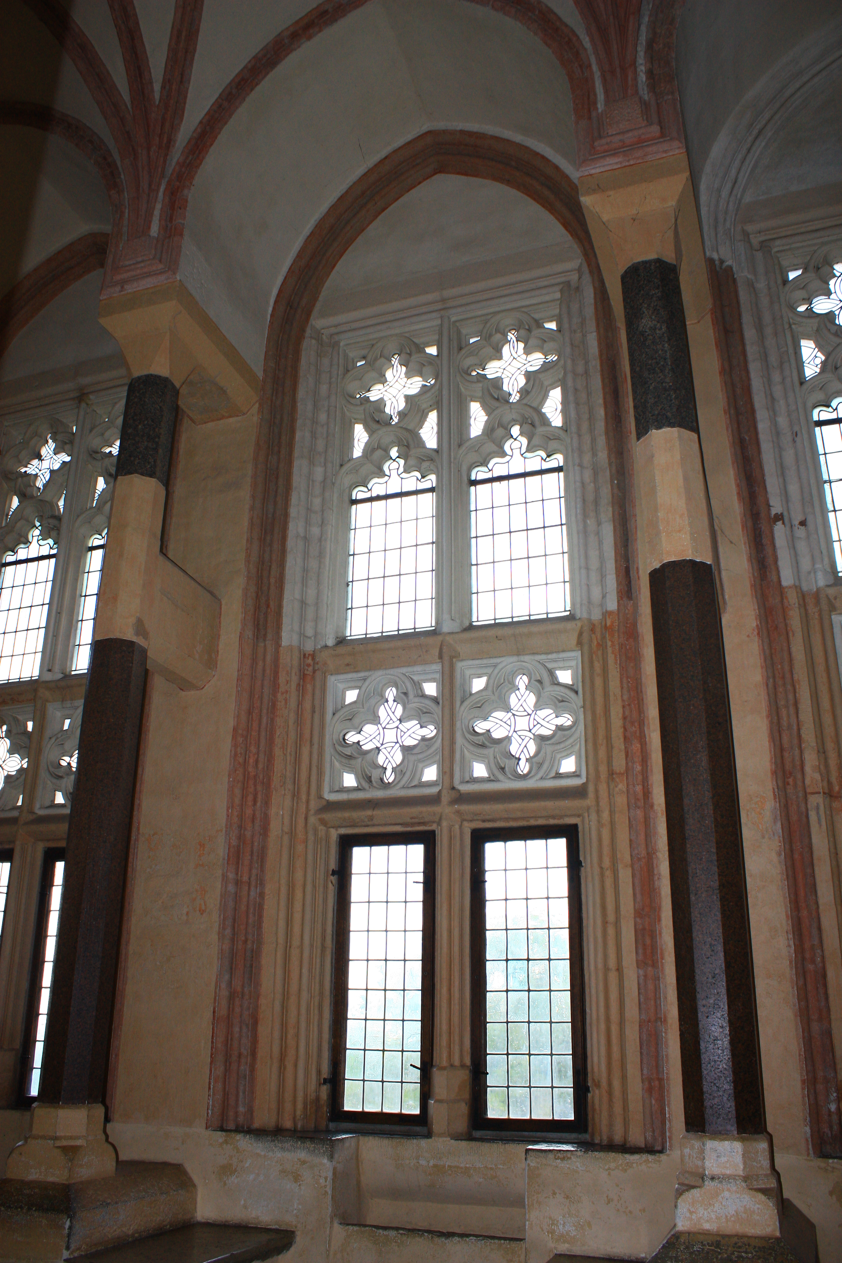 Malbork, zespół zamku krzyżackiego, XIII, XIX